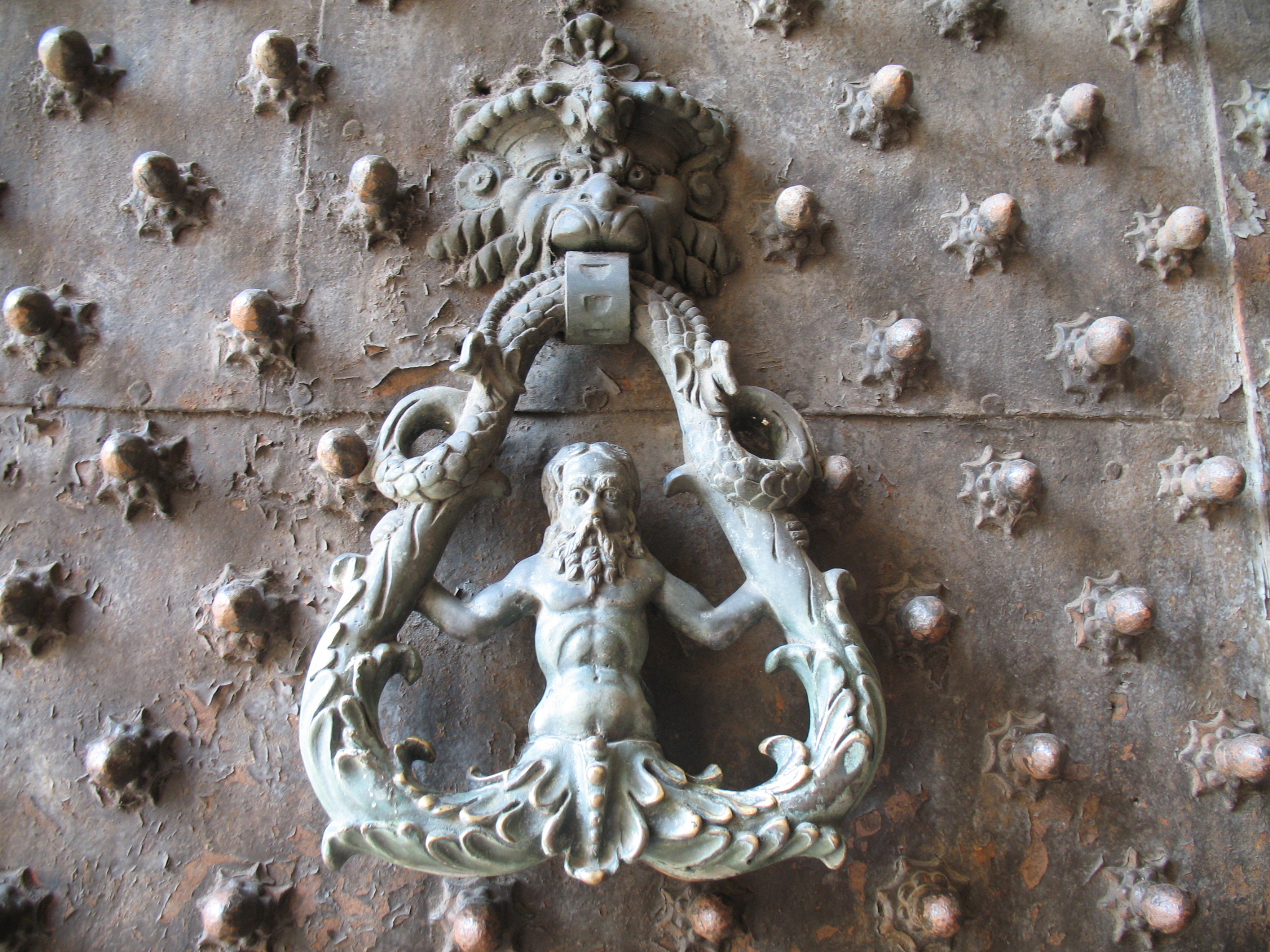 Immagine da Genova - Decorazione del portale del palazzo Ducale